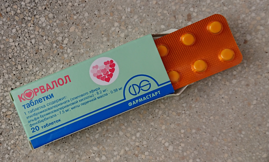 Russian Korvalol pills